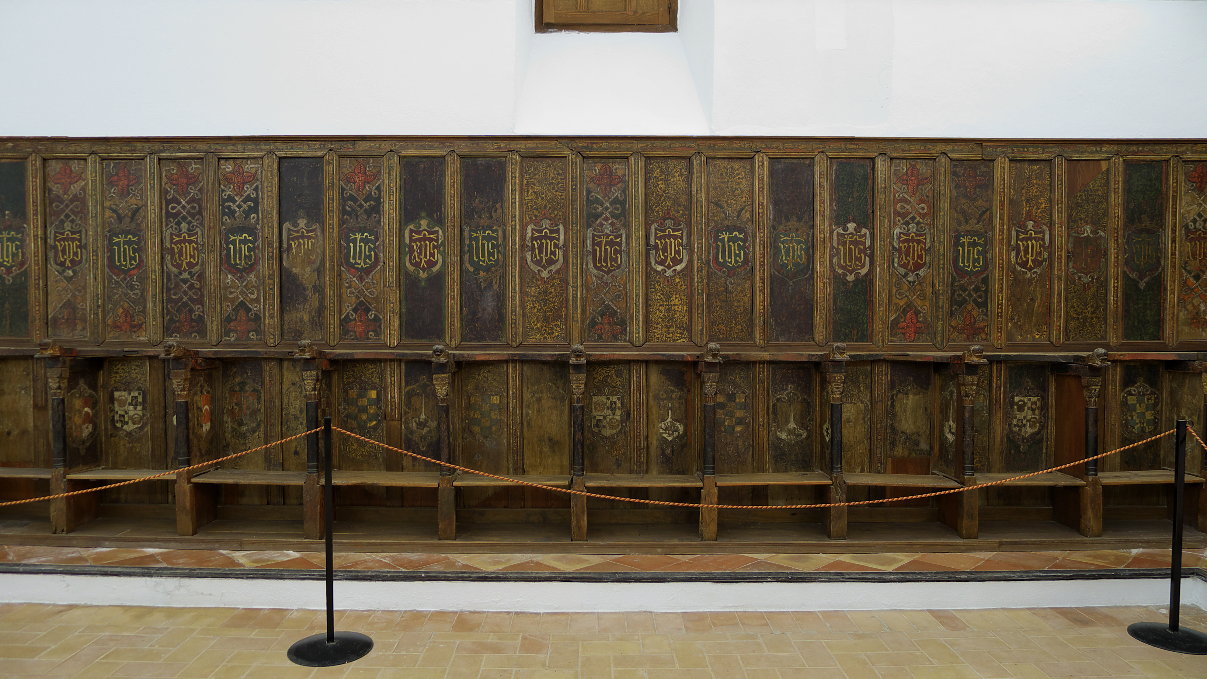 Sillería del coro, Monasterio de Santa Clara (Moguer). Original decoración con elementos del arte nazarí.